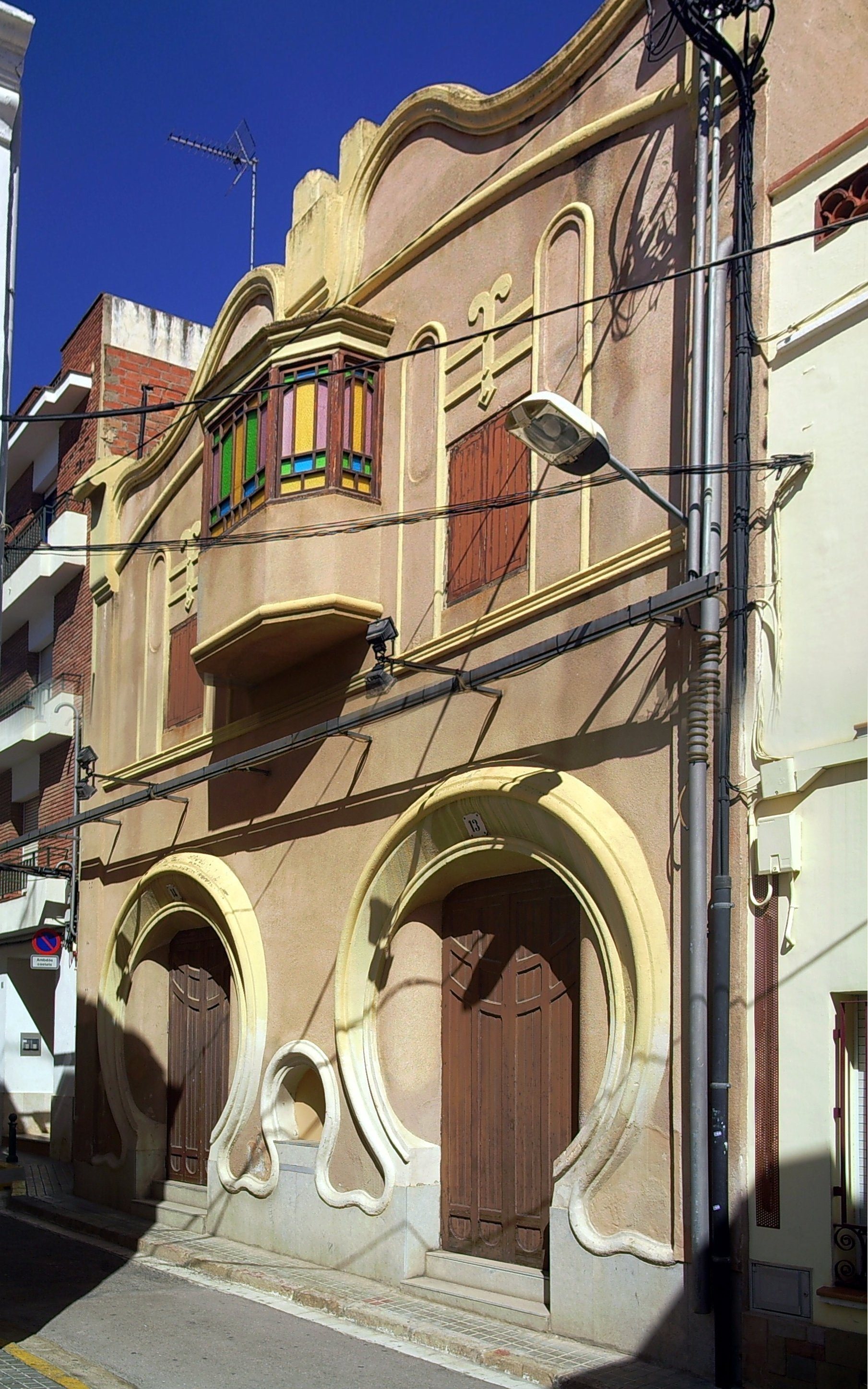 Patronat Social Premianenc, a Premià de Mar, comarca del Maresme, (Catalunya). Imatge composta amb dues fotografies, a la superior s'ha modificat lleugerament la perspectiva per coincidir millor amb la de sota, i unides horitzontalment, tot fet amb GIMP.